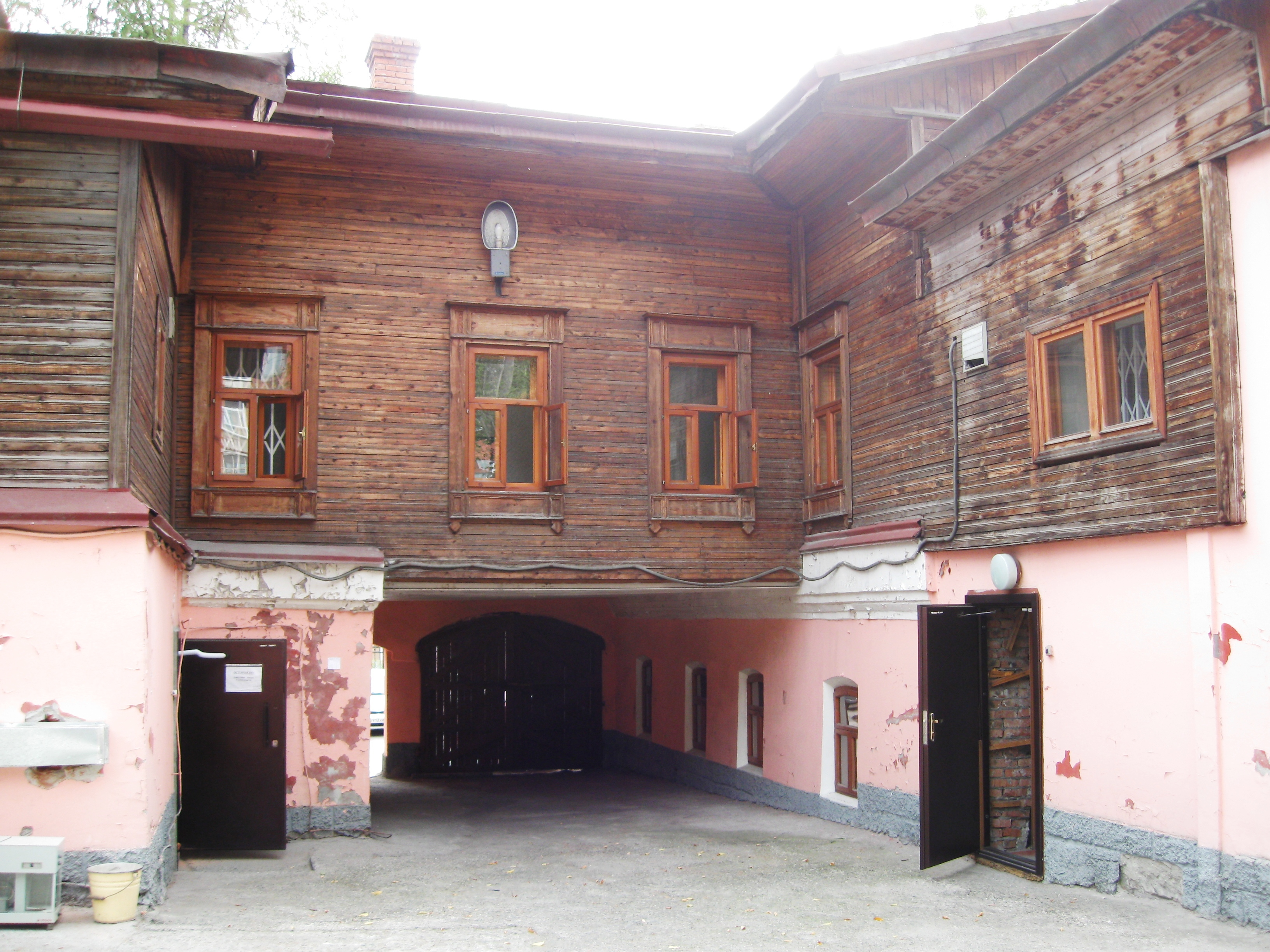 Задний двор